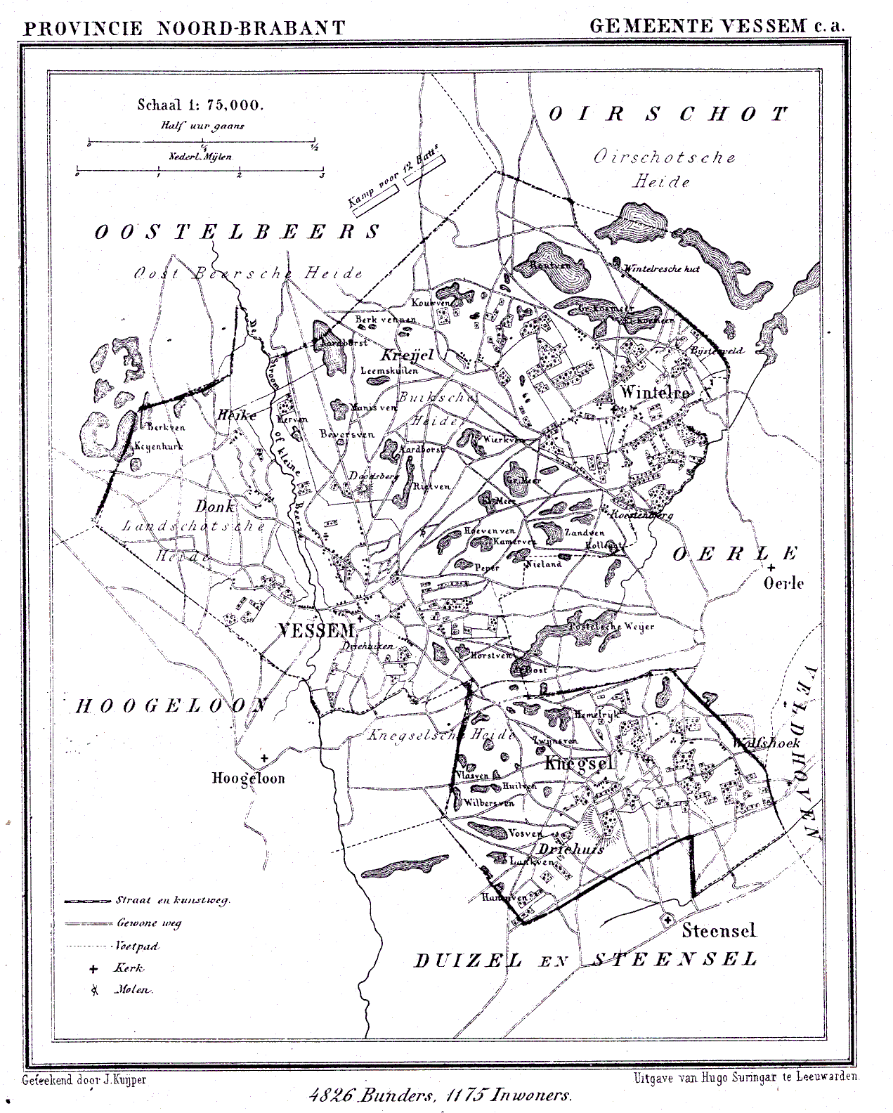 Gemeente Vessem, Noord-Brabant, Nederland (deze voormalige gemeente is nu onderdeel van de Gemeente Eersel). Municipality of Vessem, North Brabant, Netherlands (this former municipality is now part of the municipality of Eersel).